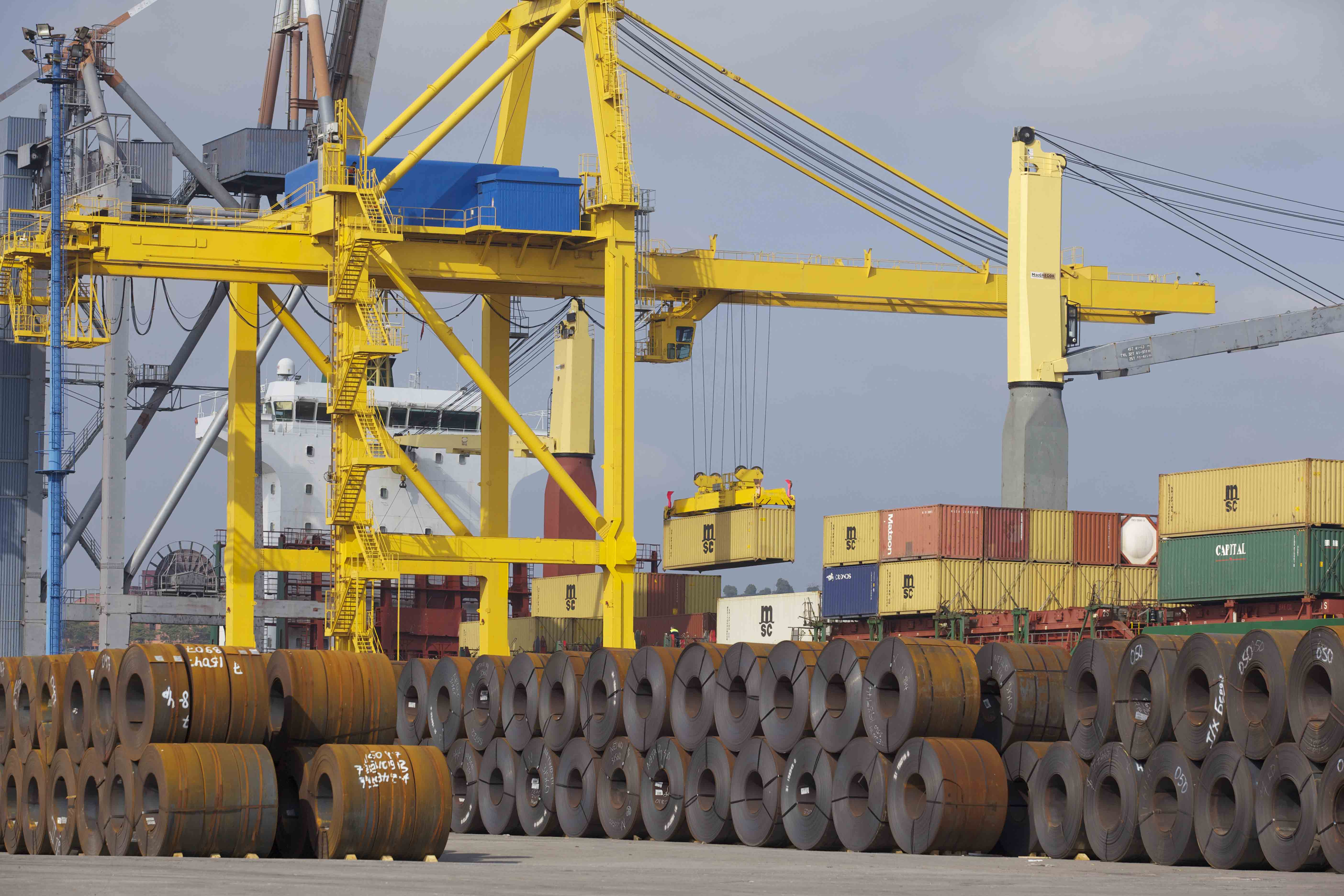 Contenedores y bobinas de acero en el Muelle de la Osa (Puerto de Gijón).